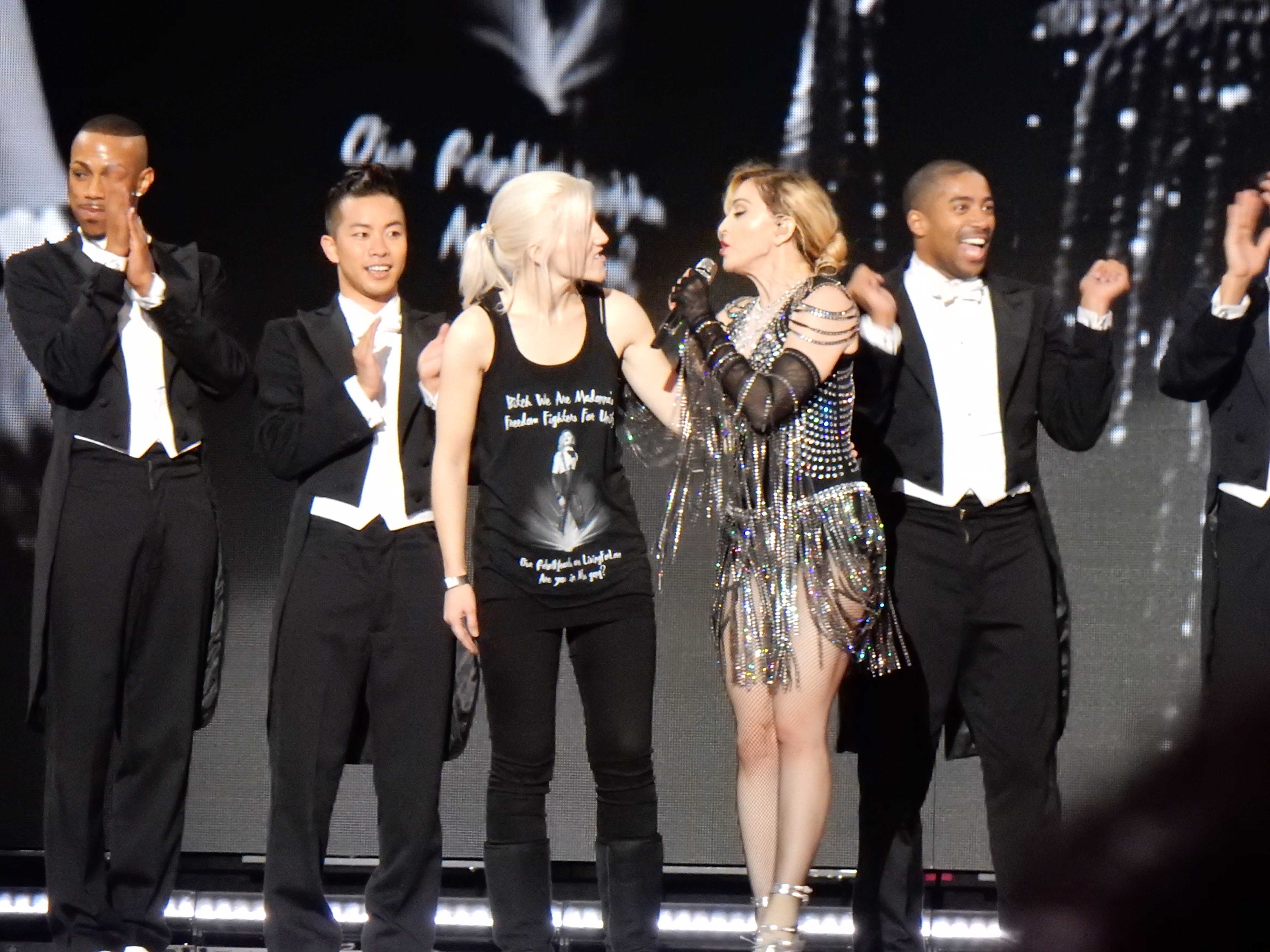 Madonna - Rebel Heart Tour Cologne 2